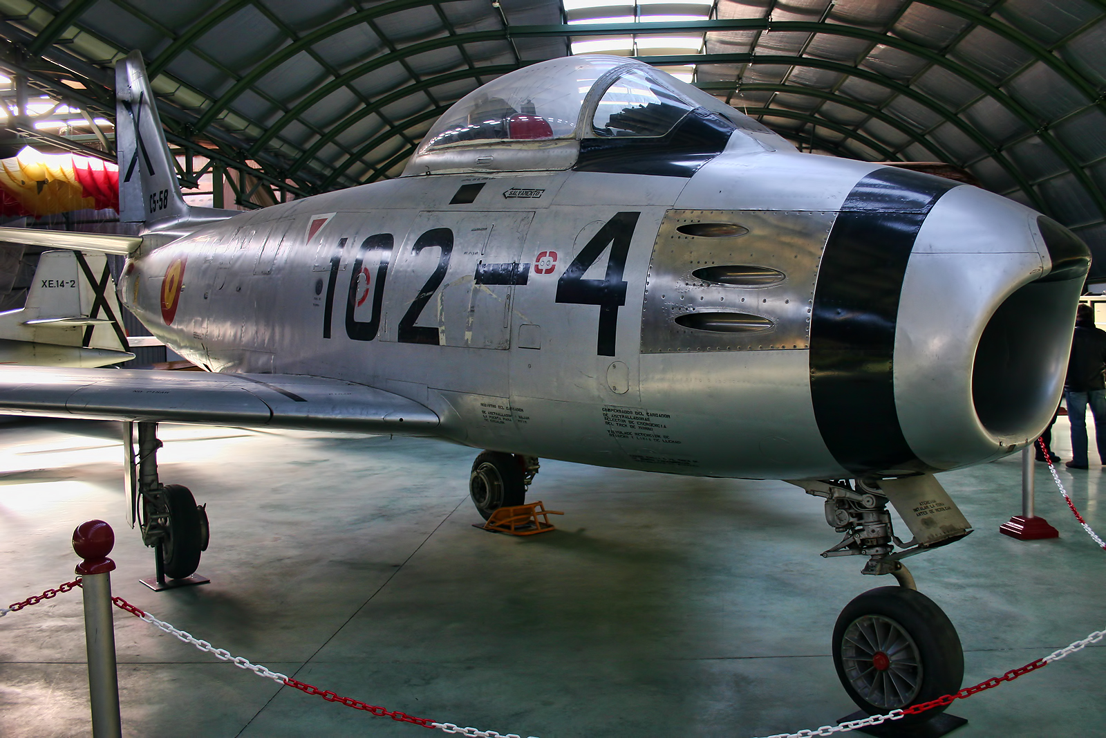 Madrid - Cuatro Vientos (LECU/LEVS)